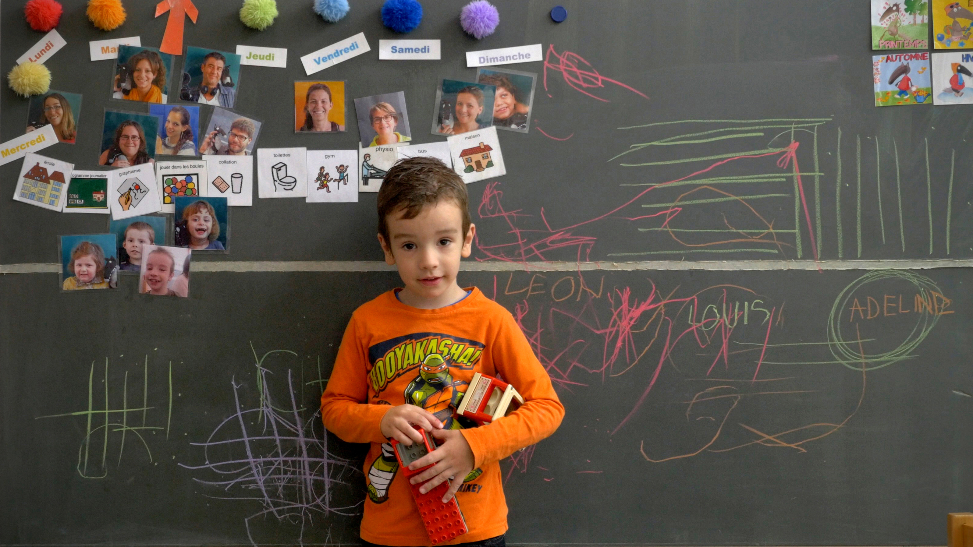 Léon devant le tableau noir de la classe.Image du film de Fernand Melgar " À l'école des Philosophes"